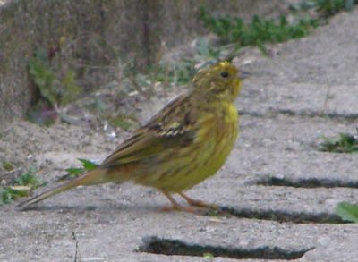 Emberiza citrinella, female